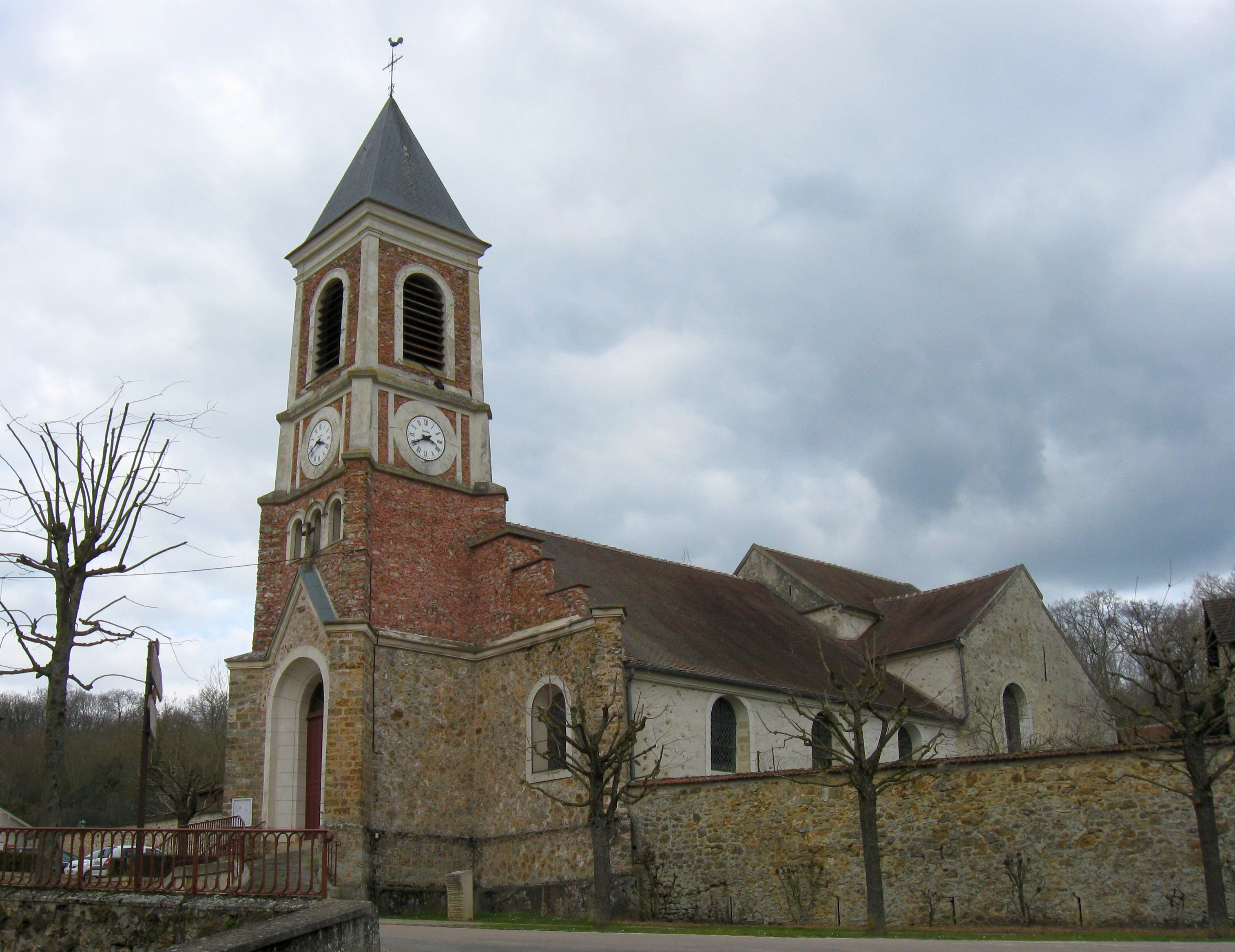 Église Saint-Nicolas de Dhuisy. (Seine-et-Marne, région Île-de-France).